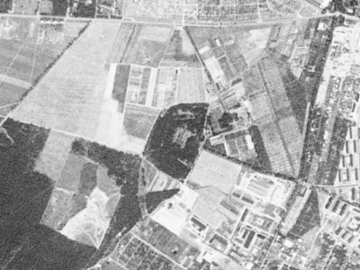 Fort VIIa Twierdzy Poznań sfotografowany przez satelitę KH-4A 1023, 23 sierpnia 1965 r.